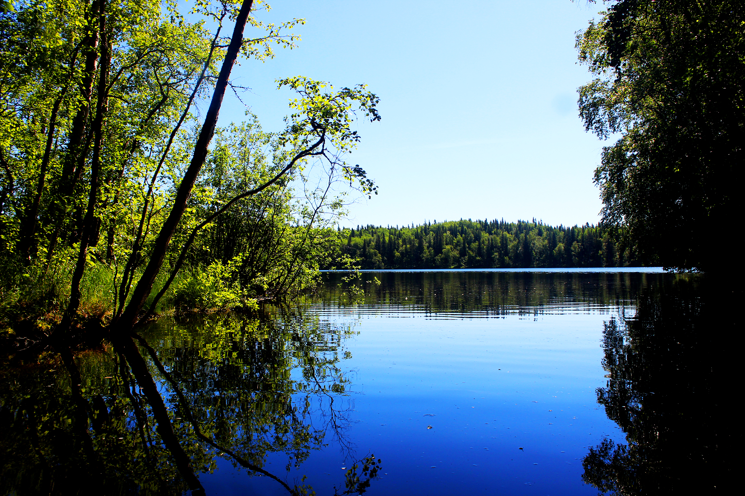 Историко-культурный комплекс Соловецких островов (Республика Карелия, Беломорск, Соловецкие острова)